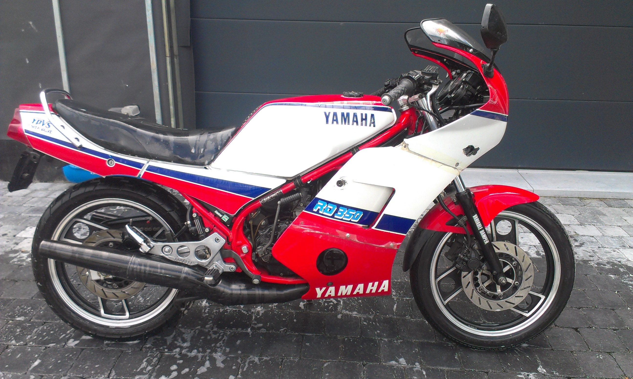 Yamaha RD 350 F (57V) 1985